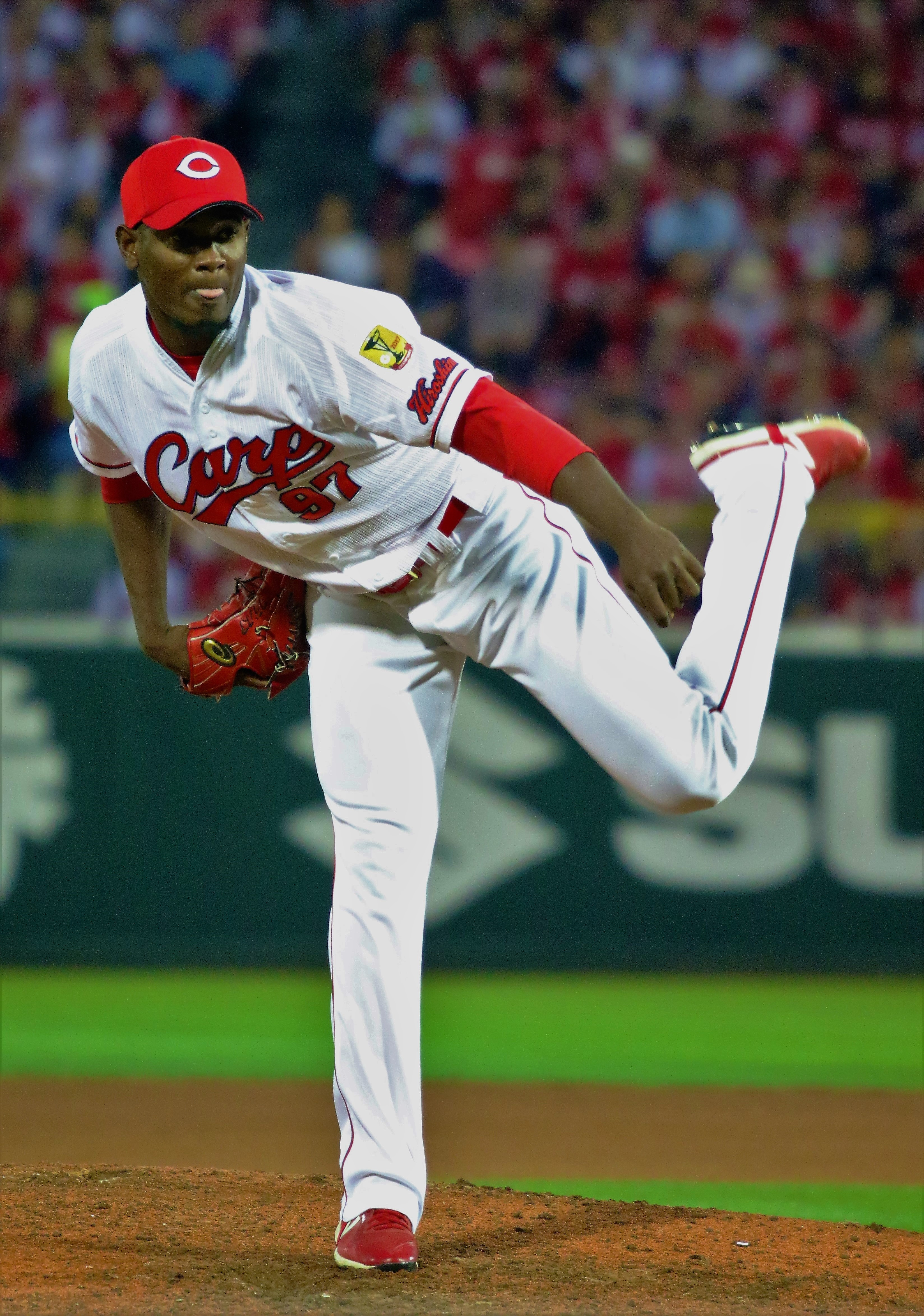 2018年6月18日マツダスタジアム